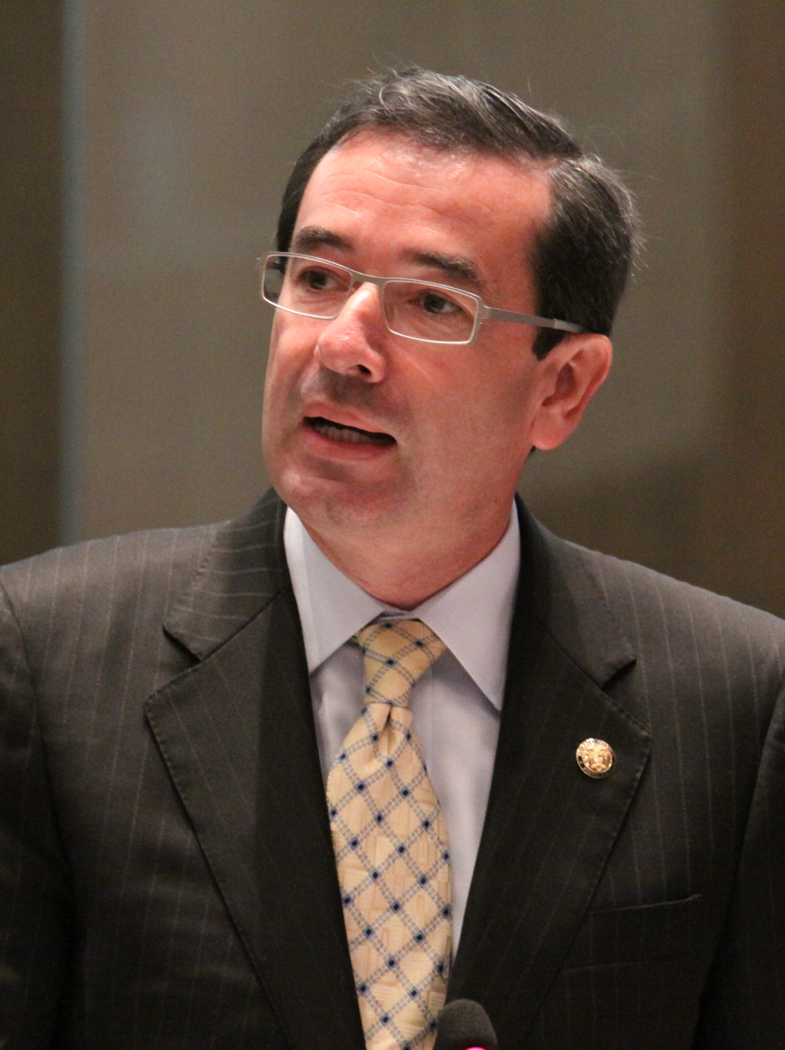 Juan Carlos Cassinelli en 2011.